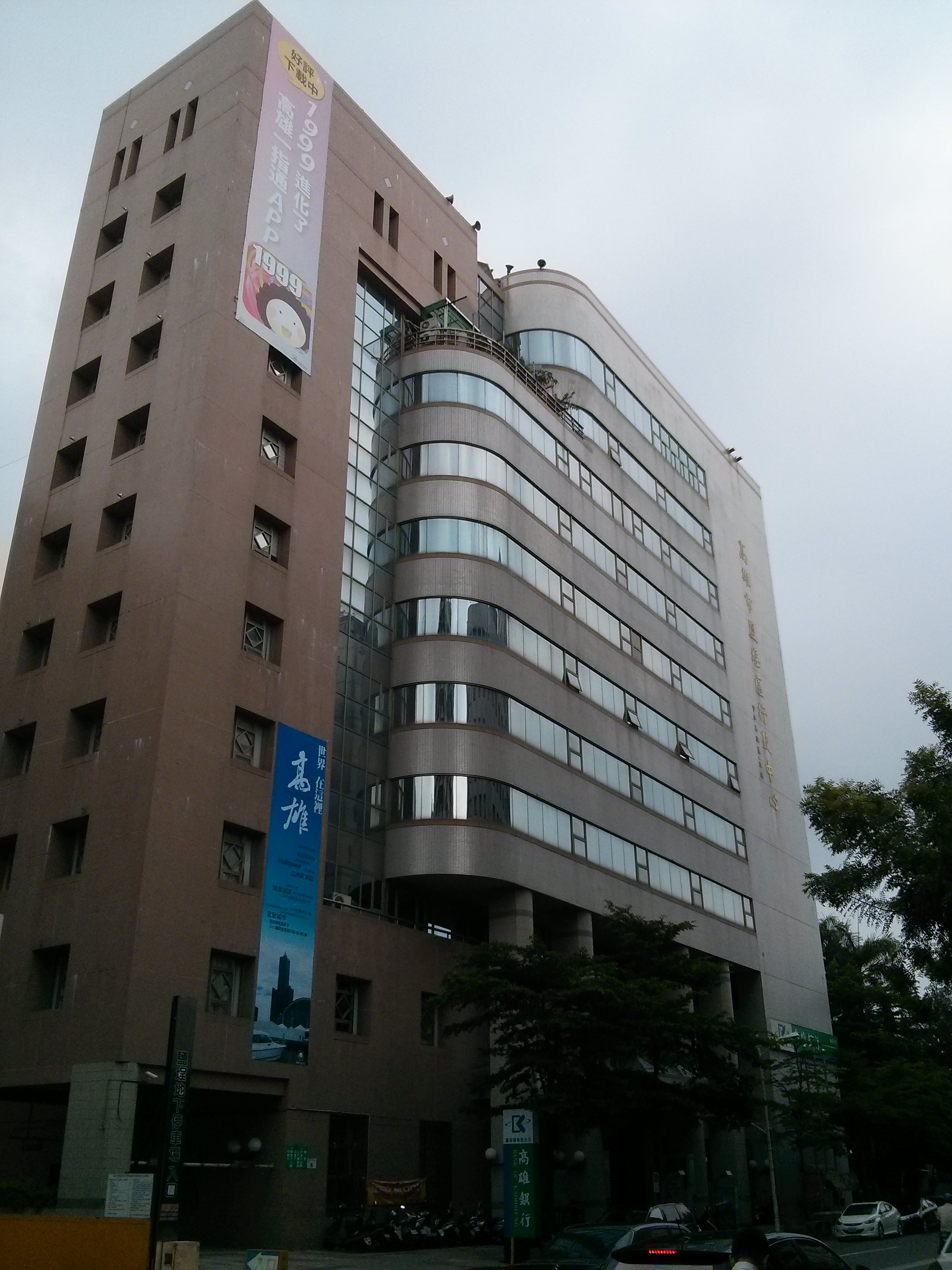 高雄市鹽埕區行政中心